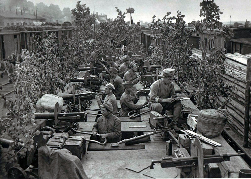 checkoslovak legion's armored train sporting an impressive array of various machineguns. Skupina západní. Čs. improvizováný obrněný vlak Orlík, součást penzenské skupiny, vyzbrojený 11 kulomety a 1 dělem. Ufa, červenec 1918.